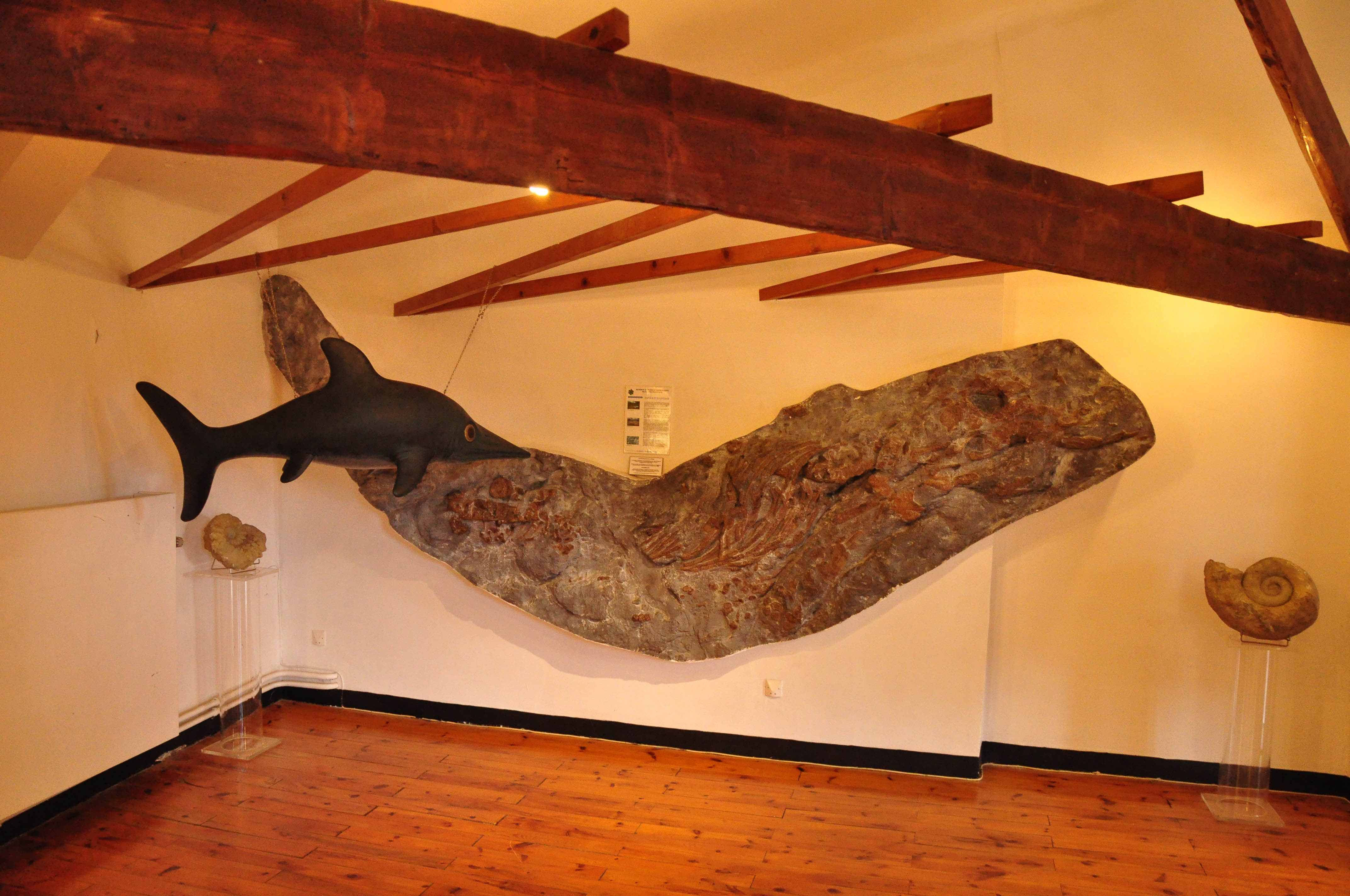 Ichtosaurius de la réserve géologique de Haute-Provence